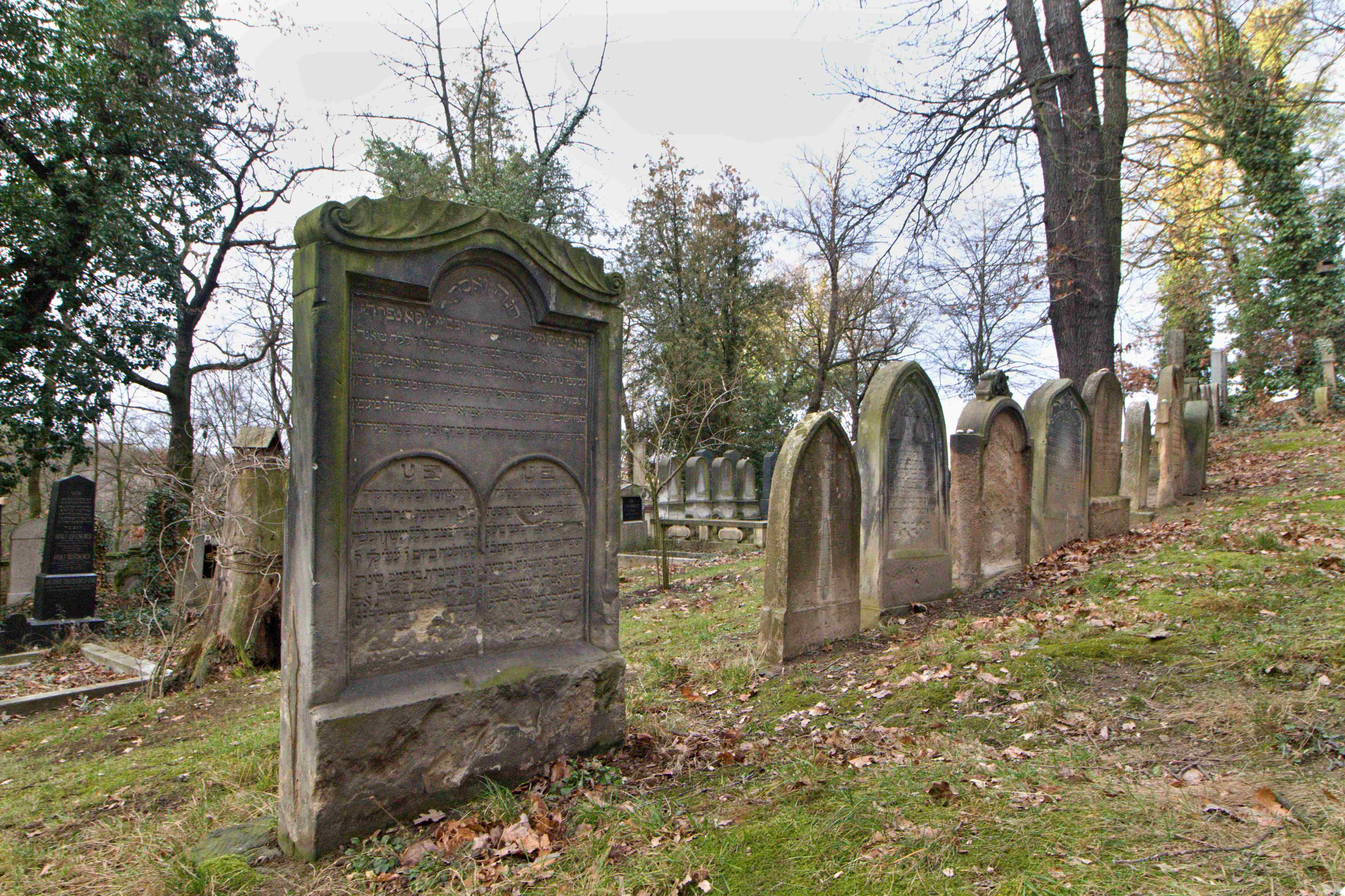 Blevice, okres Kladno